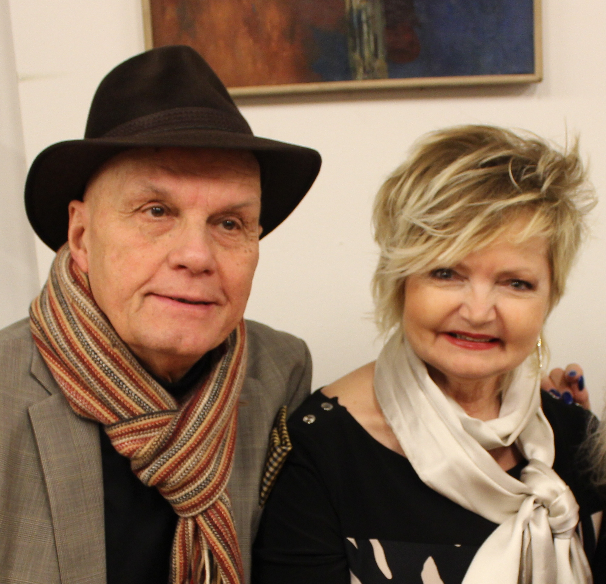 Jan Přeučil a Eva Hrušková na Maxiautogramiádě konané v pražské galerii Mánesova 54 péčí Vratislava Ebra.